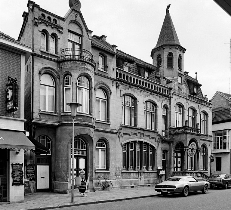 Oud stadhuis, thans museum, voorgevel